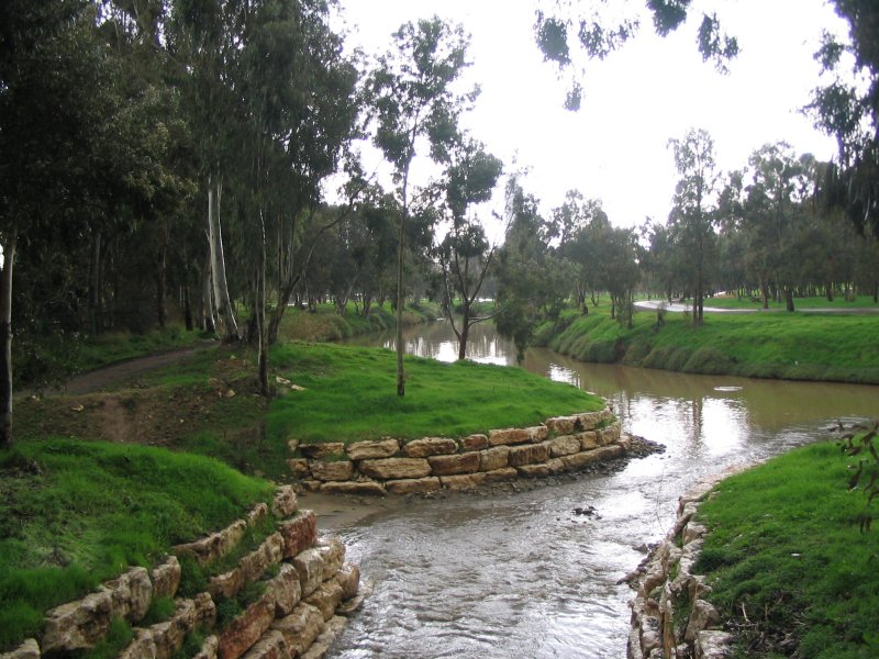 קטע מנחל הירקון באיזור רמת-גן, סמוך לגני יהושע (צילום עצמי)